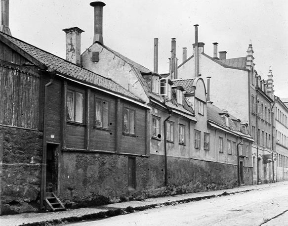 Fjällgatan 26-24-22